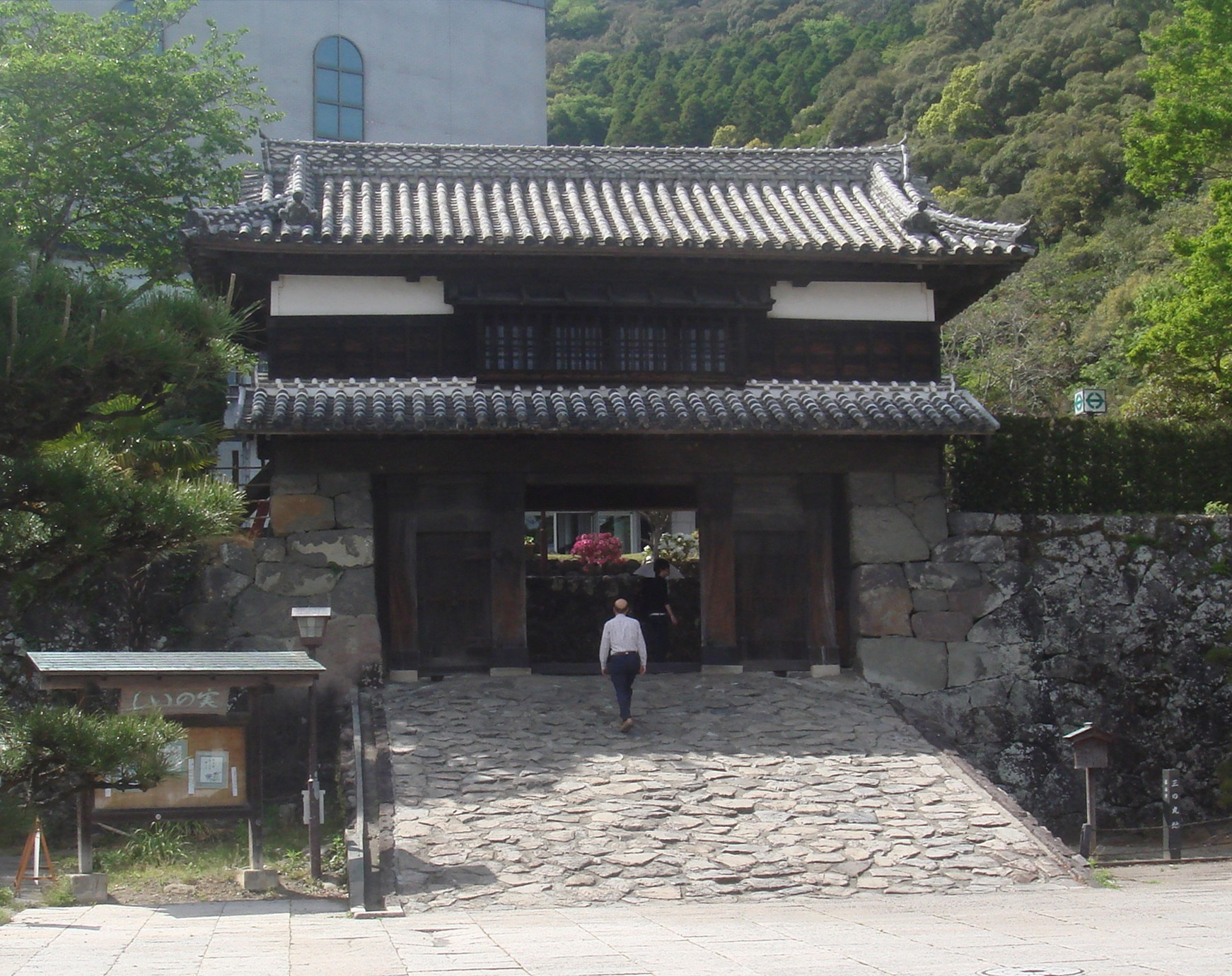 豊後国大分県佐伯市にあった佐伯城の三の丸櫓門を三の丸外正面から見た。